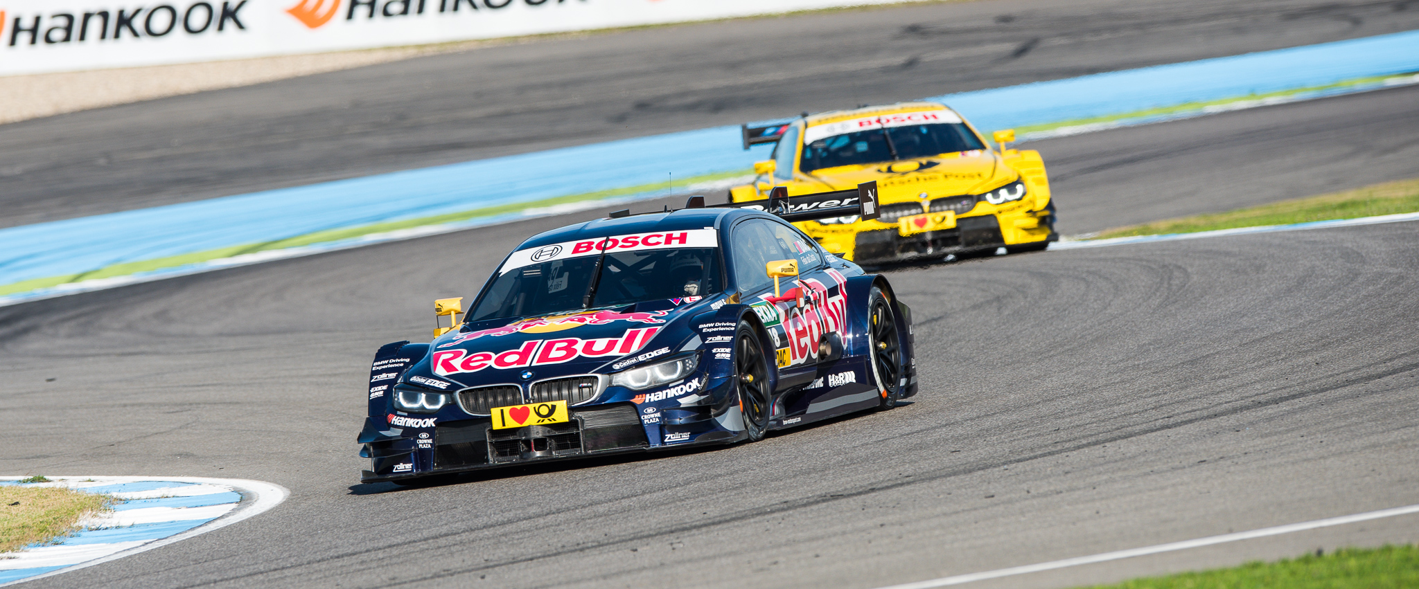 Antonio Felix da Costa,DTM,Deutsche Post BMW M4 DTM,Deutsche Tourenwagen Masters,Hockenheimring,MTEK GmbH,Motorsport,Red Bull BMW M4 DTM,Timo Glock